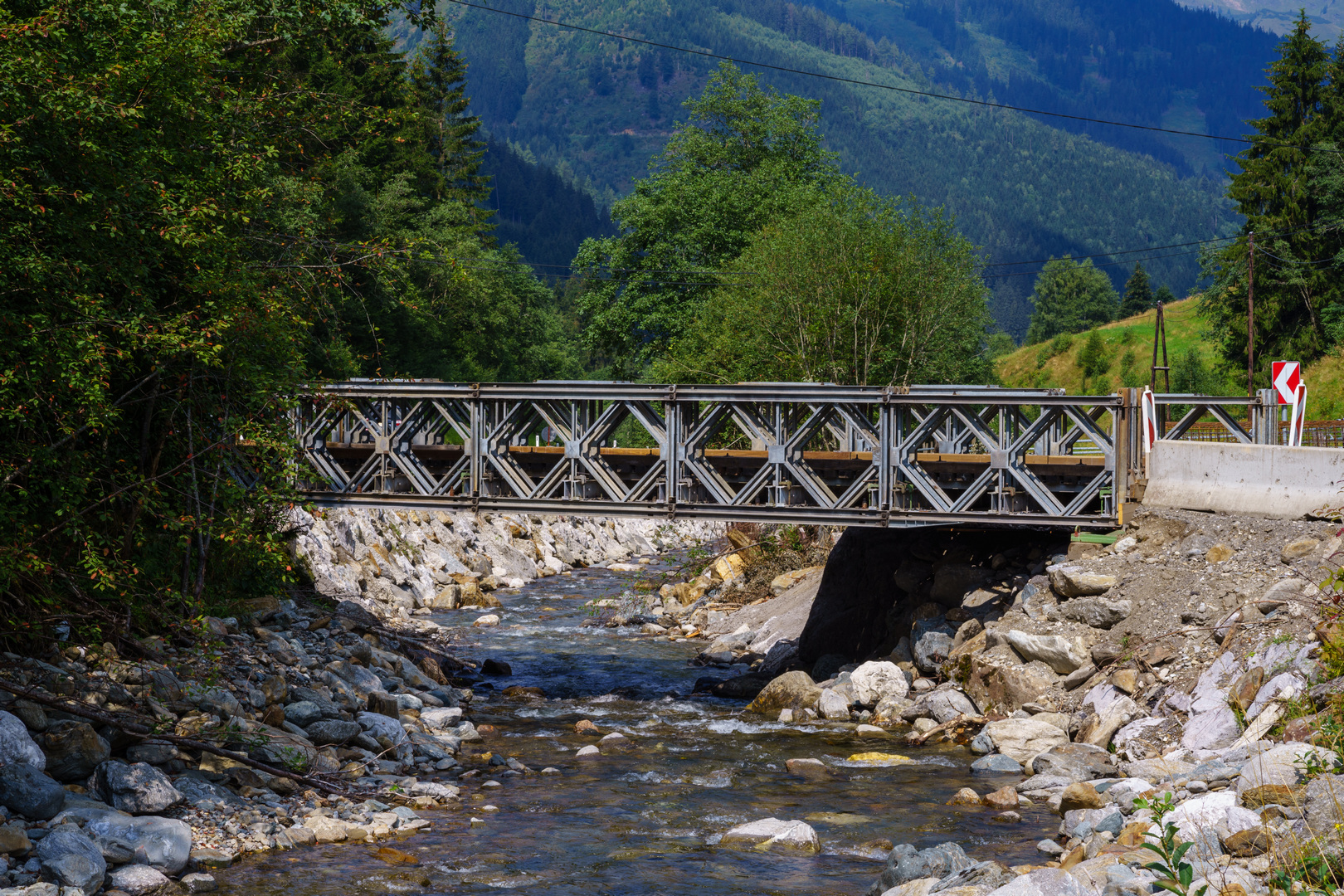 Original description: “Austria 2018”